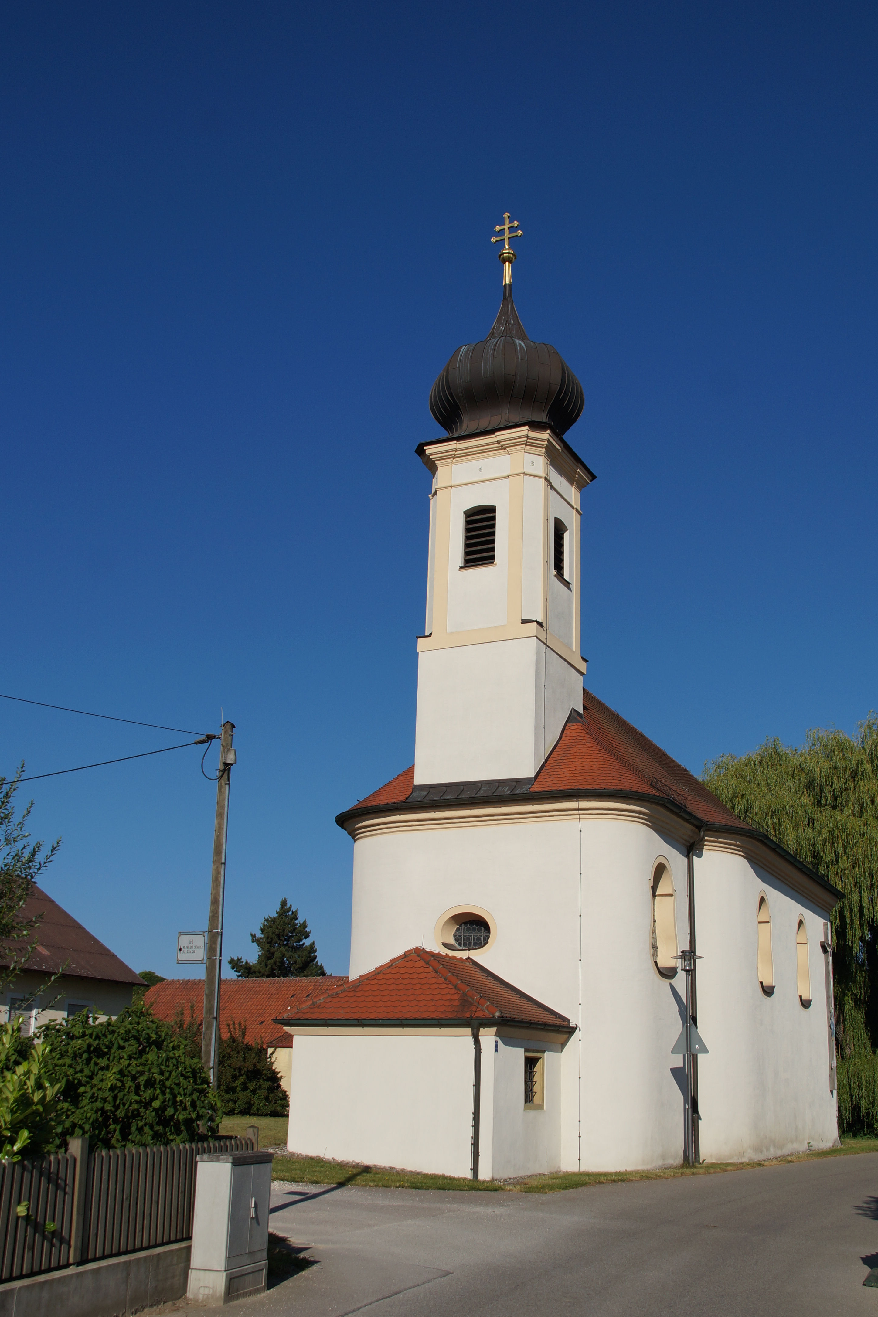 Katholische Nebenkirche St. Maria, Saalbau mit abgewalmtem Satteldach, eingezogenem Ovalchor und Chortürmchen mit Zwiebelhaube, im Kern spätmittelalterlich, 1584 renoviert (bezeichnet), 1759 grundlegend erneuert; mit Ausstattung